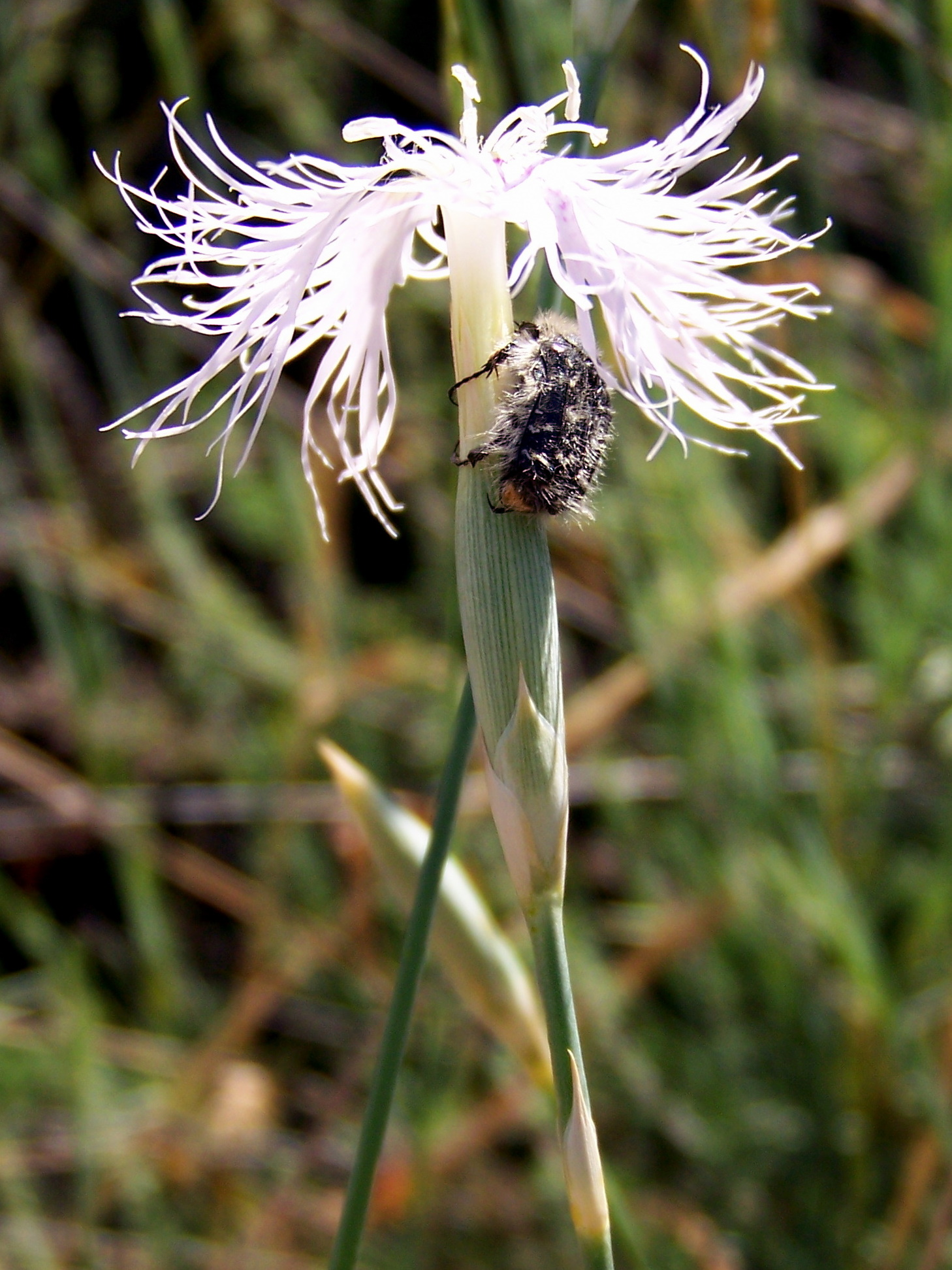 Dianthus broteroi (con Oxythyrea funesta): Inflorescencia, vista lateral - Cabezo de los Ojales, Albatera (Alicante, España).